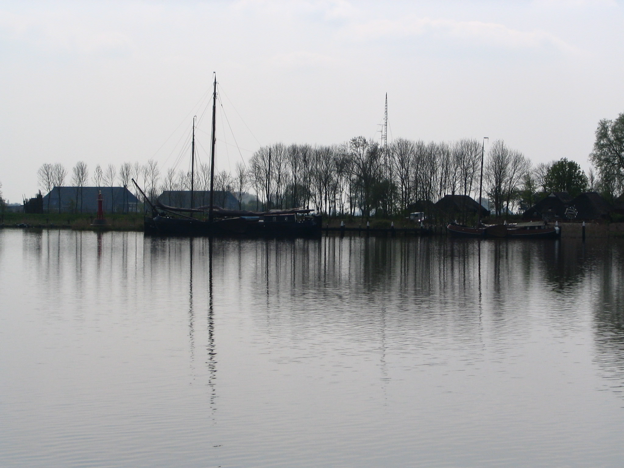 Eigen foto. GerardM 27 apr 2004 09:07 (CEST) De Friese zijde van het Reitdiep gezien vanuit Zoutkamp.